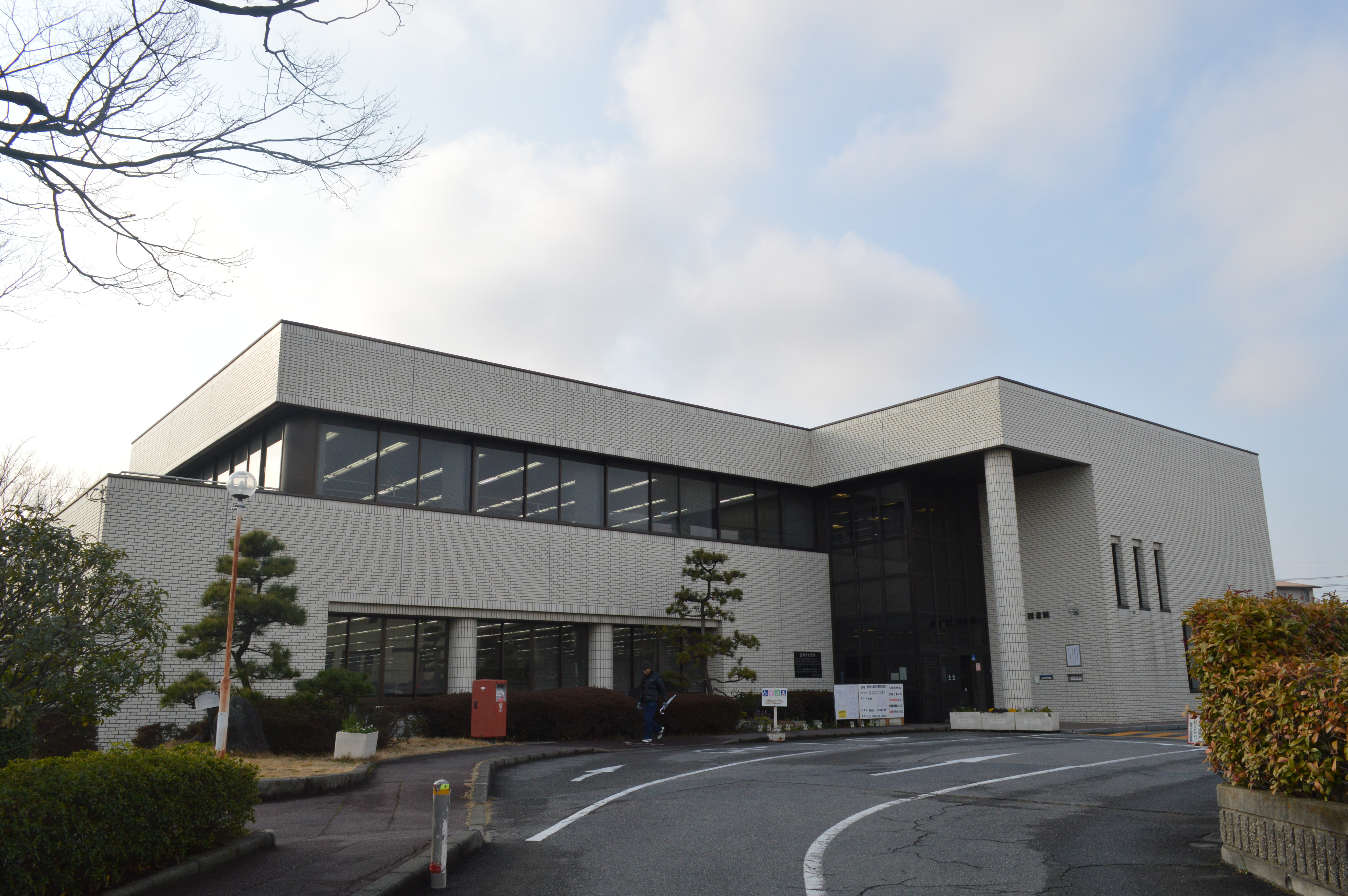 愛知県豊明市の豊明市立図書館。